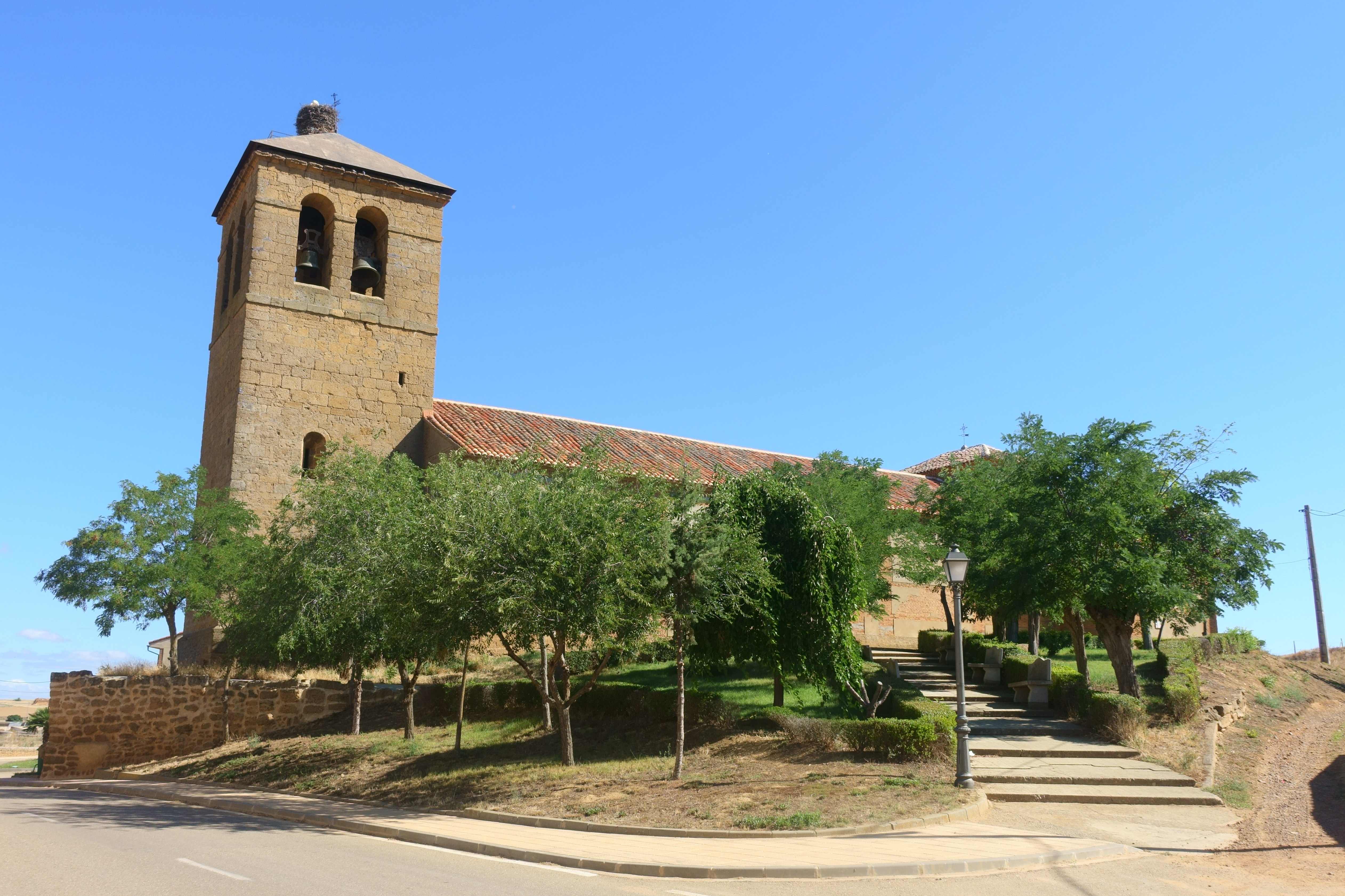 Iglesia de San Pedro, Villalobos (Zamora, España).